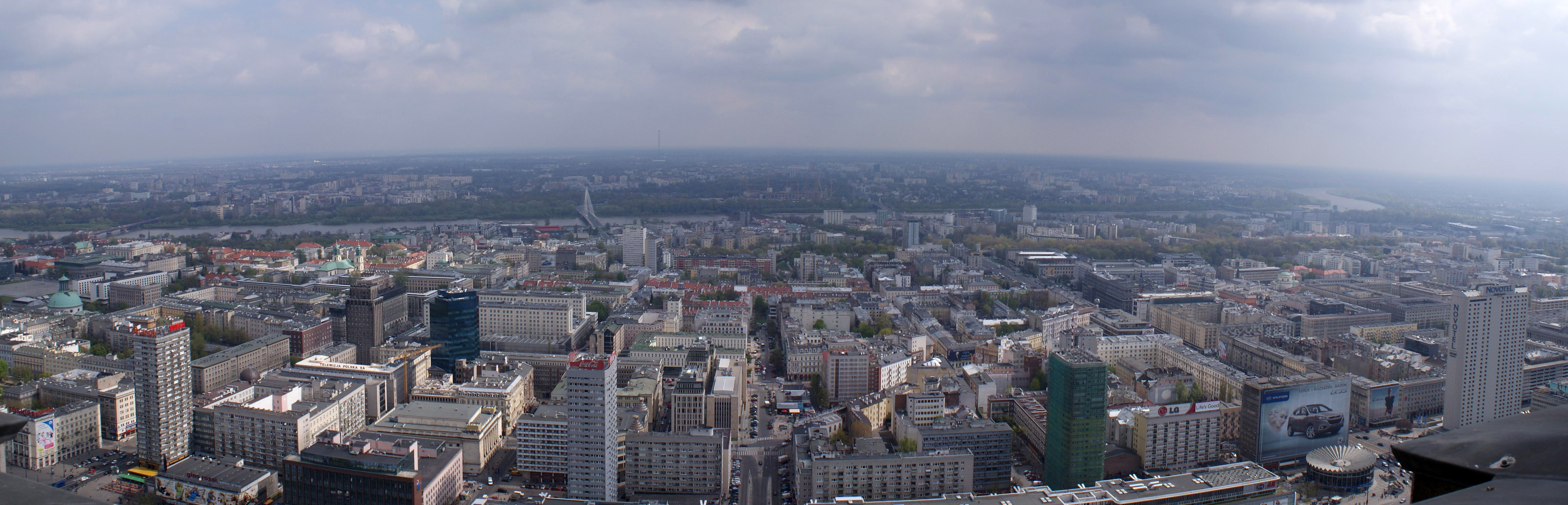 Panorama Warszawy, widok ze wschodniej części balkonu na 37 piętrze Pałacu Kultury i Nauki. Na pierwszym planie Śródmieście Północne, nieco dalej Powiśle.